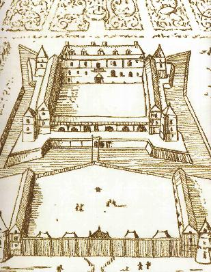 Vue du premier château de Versailles. Vignette d'une gravure des "Maisons royalles et remarquables aux environs de Paris" (Bibliothèque nationale, Département des estampes)